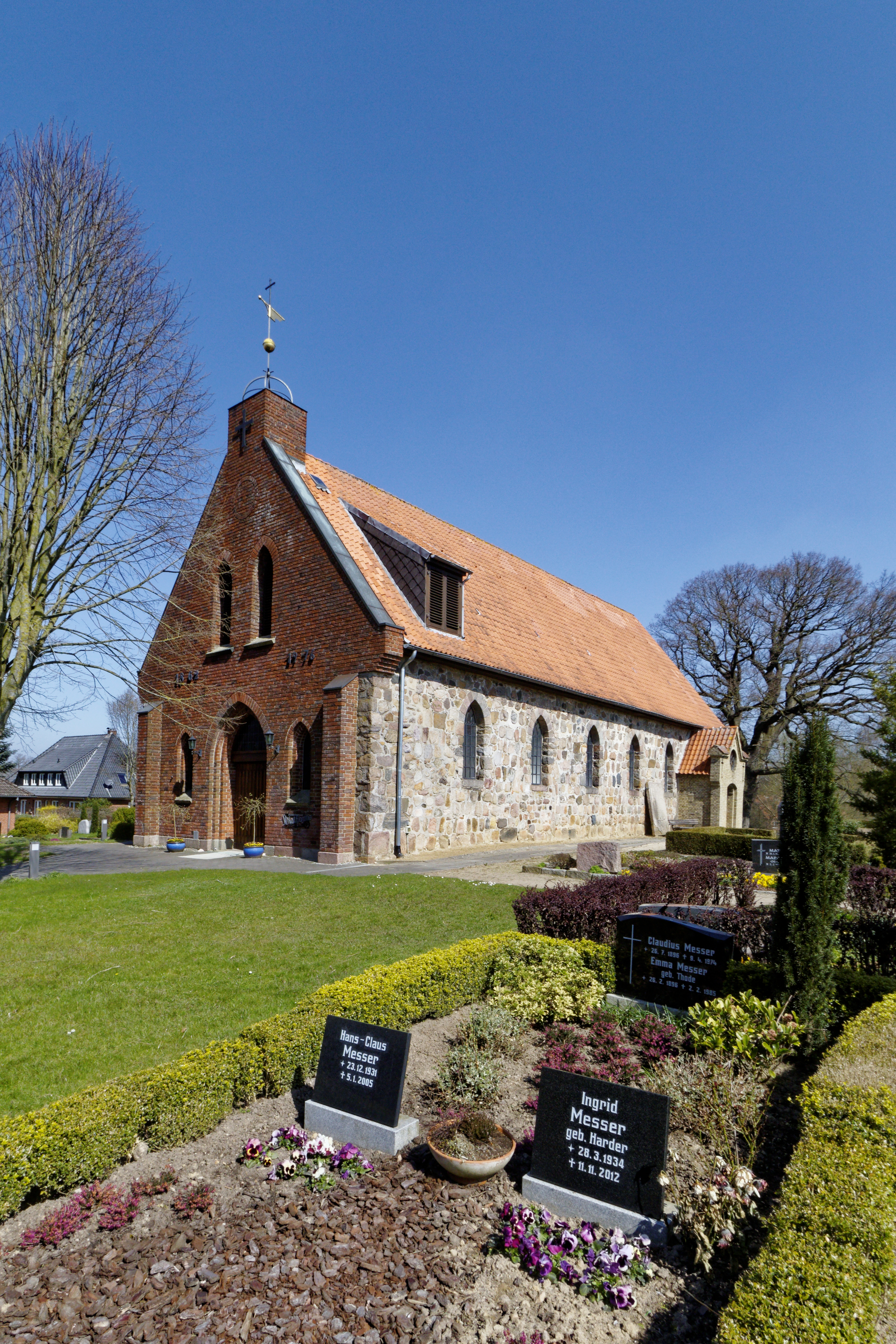 Bünsdorf, Dörperstraat; Kirche